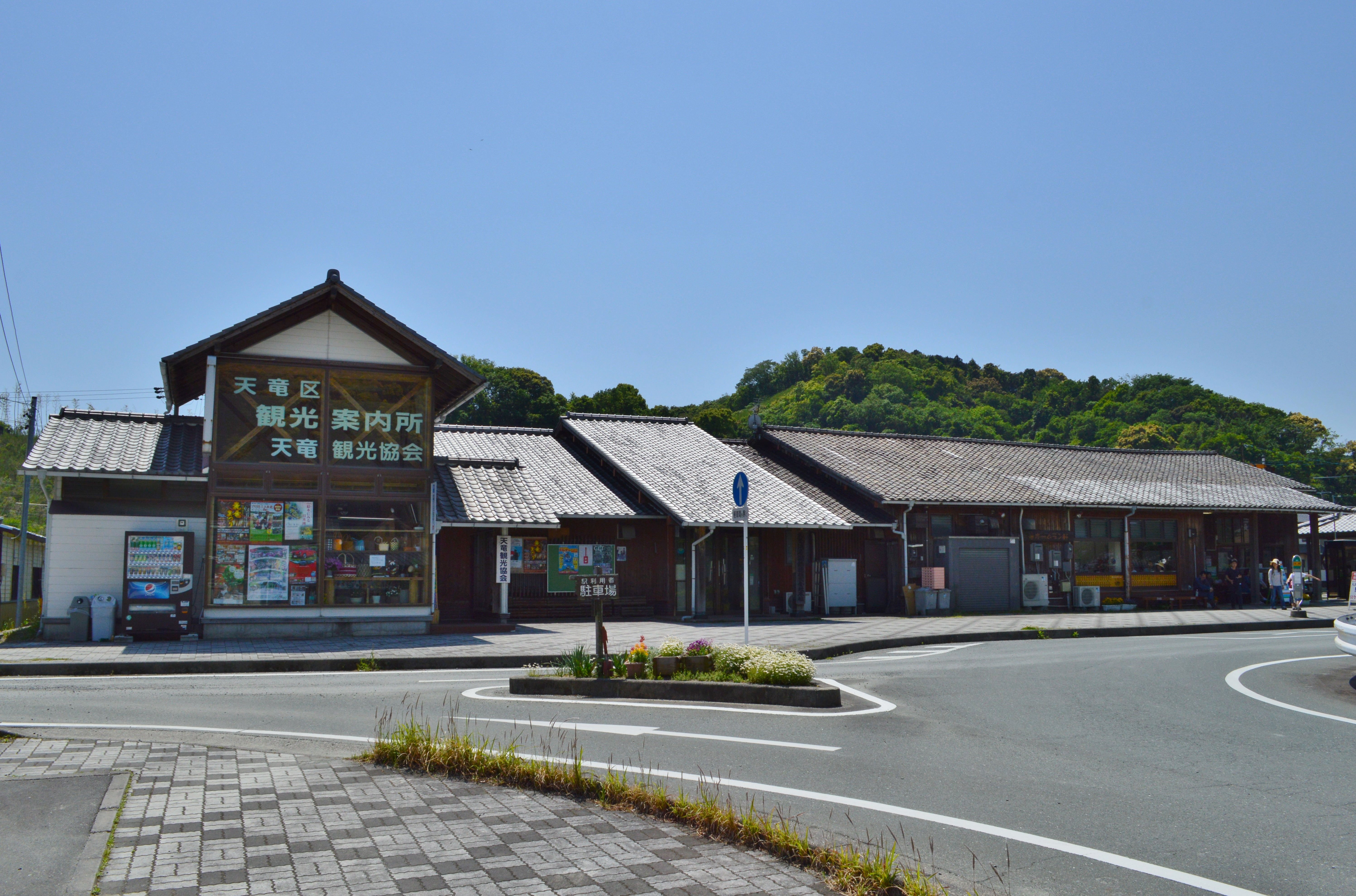 天竜二俣駅 駅舎